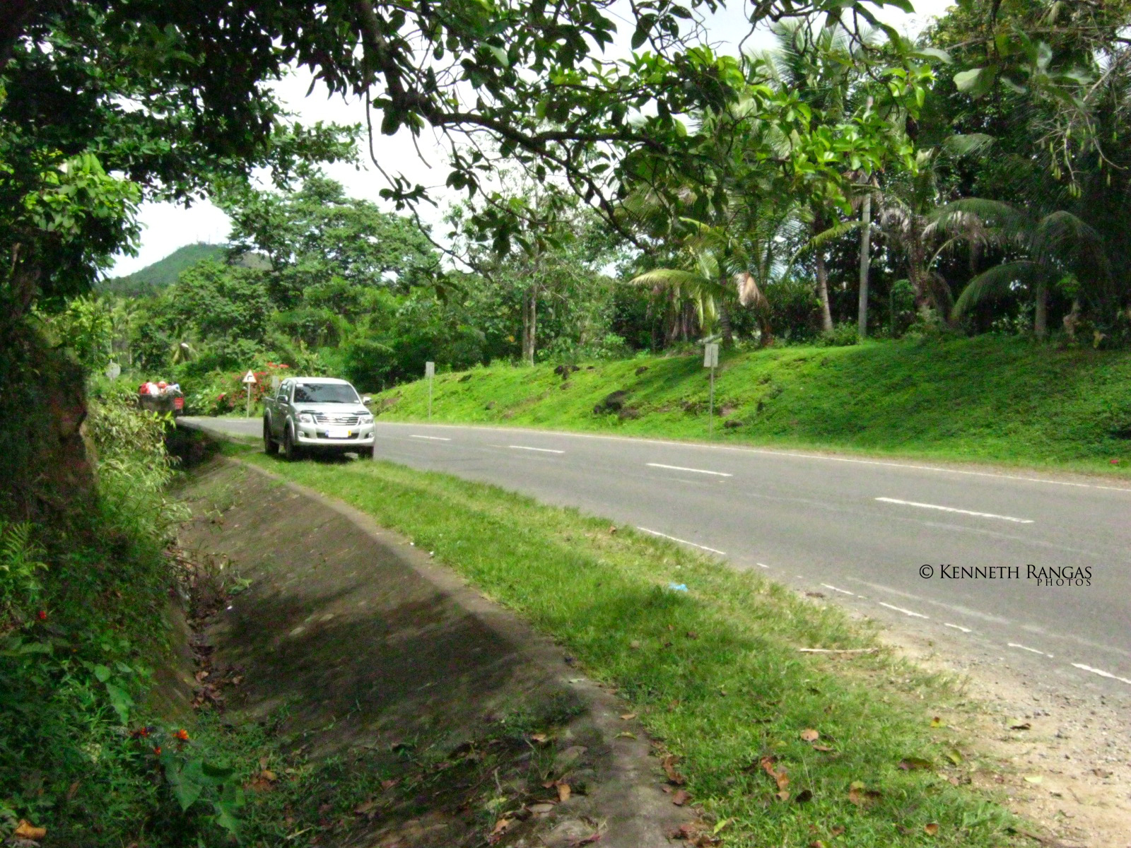 Sayre Highway, Poblacion, Damulog, Bukidnon